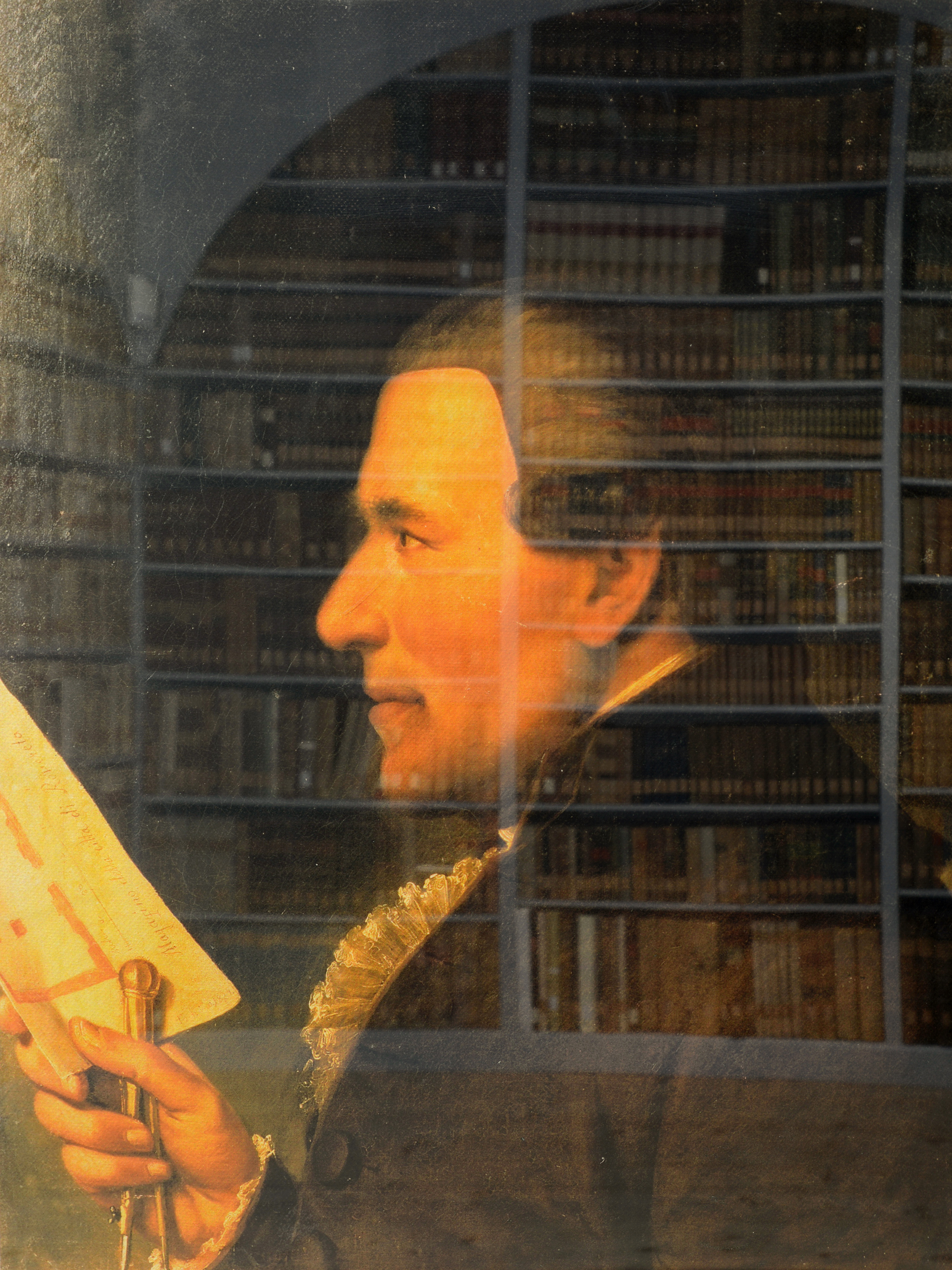 Questa immagine riproduce la copia fotografia del ritratto di Ambrogio Rosmini (originale pittorico conservato presso Casa Rosmini), presente presso la Biblioteca civica di Rovereto (per gentile concessione della Biblioteca Civica Tartarotti, foto di F. Badocchi)